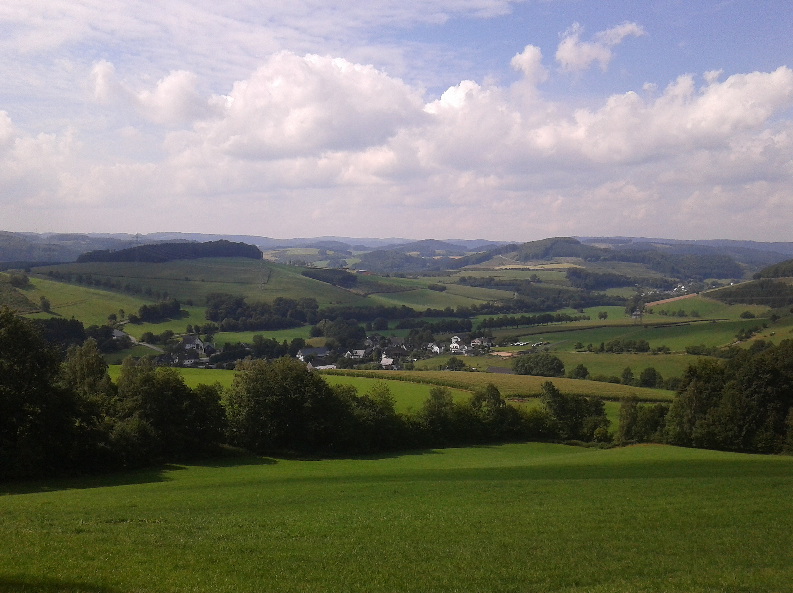 Schmallenberg-Mailar, (Germany)